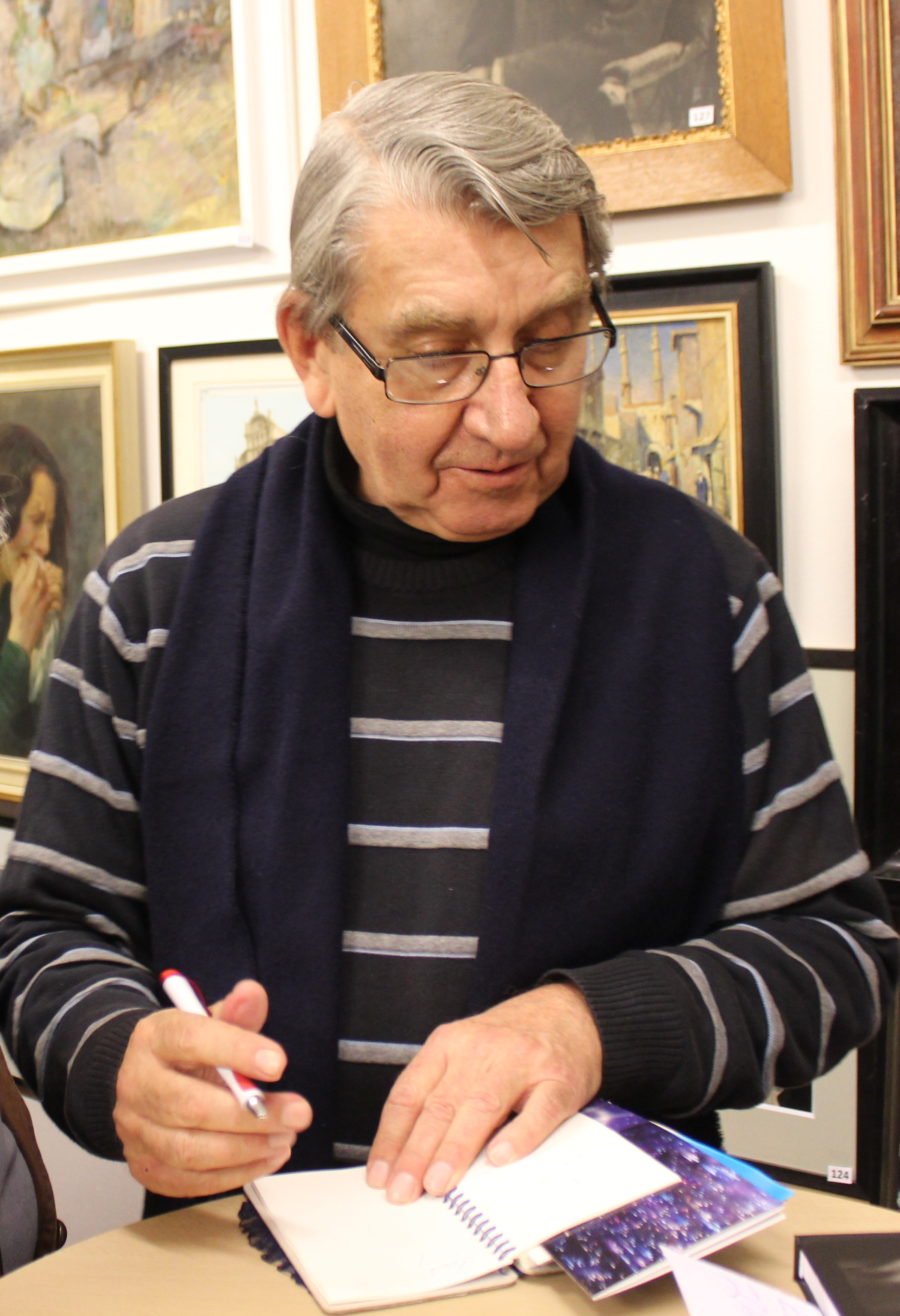 Jiří Klem na Maxiautogramiádě konané v pražské galerii Mánesova 54 péčí Vratislava Ebra.